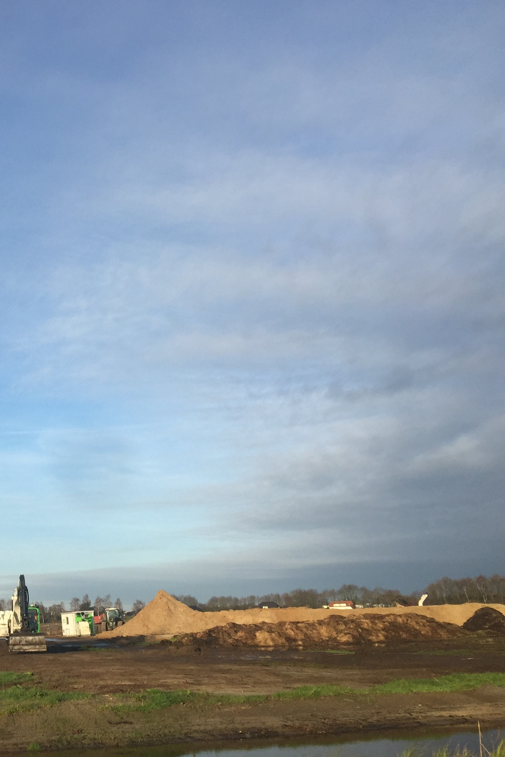 Afgraving voedselrijke gronden zodat de natte natuur zich kan herstellen.